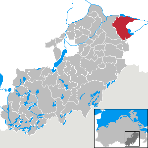 Galenbeck in Mecklenburg-Vorpommern, Landkreis Mecklenburg-Strelitz